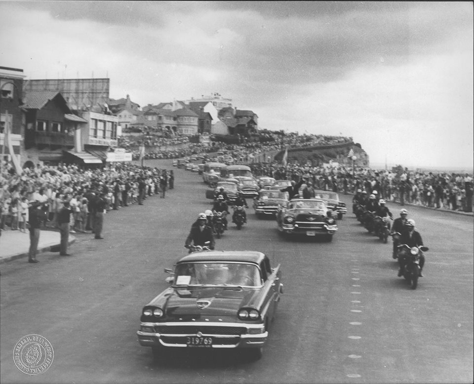 Visita del presidente de los Estados Unidos, Dwight David Eisenhower a la ciudad de Mar del Plata, acompañado por el presidente Arturo Frondizi, 27 de febrero de 1960. Documento Fotográfico. Inventario 270813.